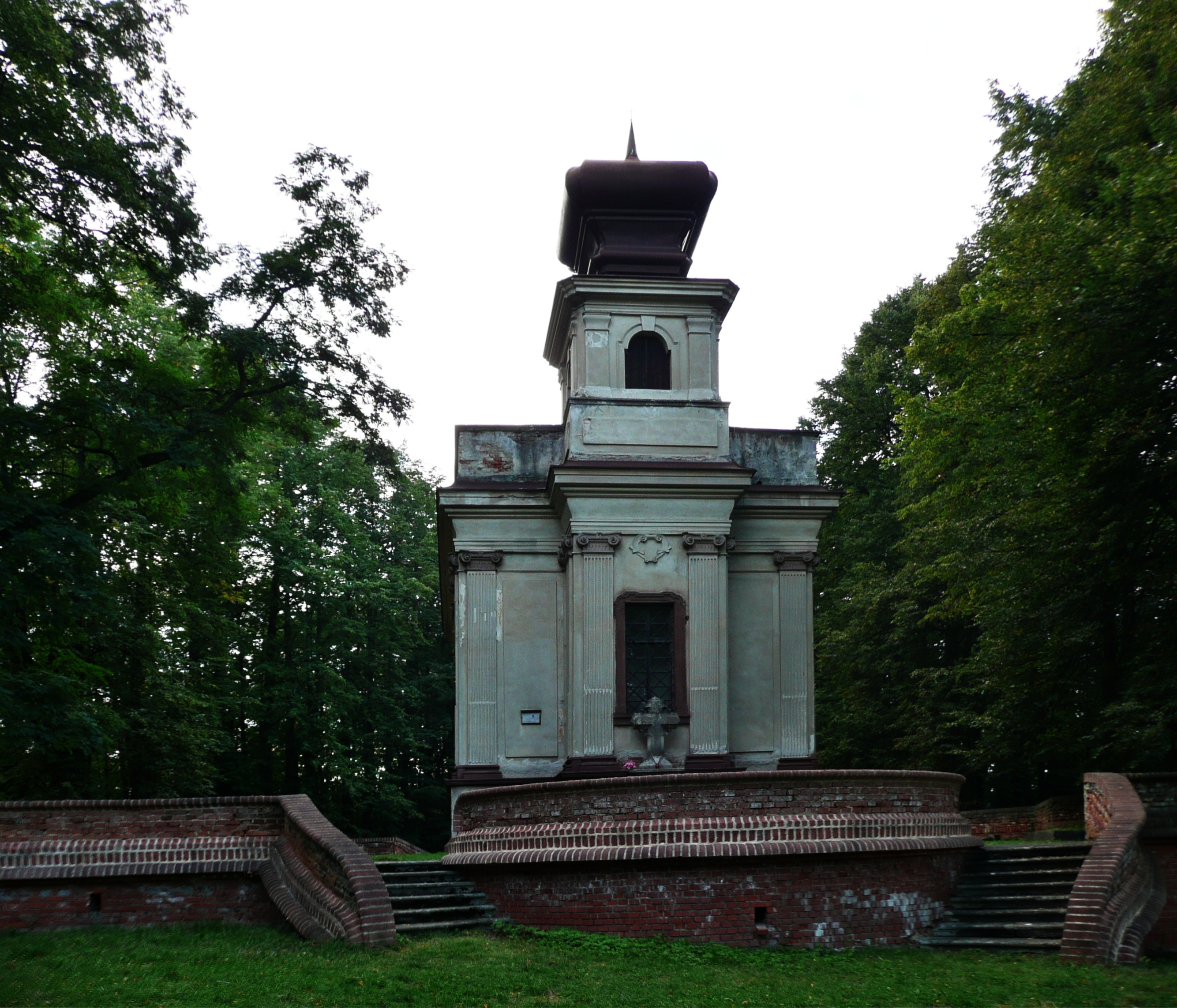 Loreta (Bolinka), na Spáleném vrchu jižně od silnice Vlašim-Bolina, Bolinka